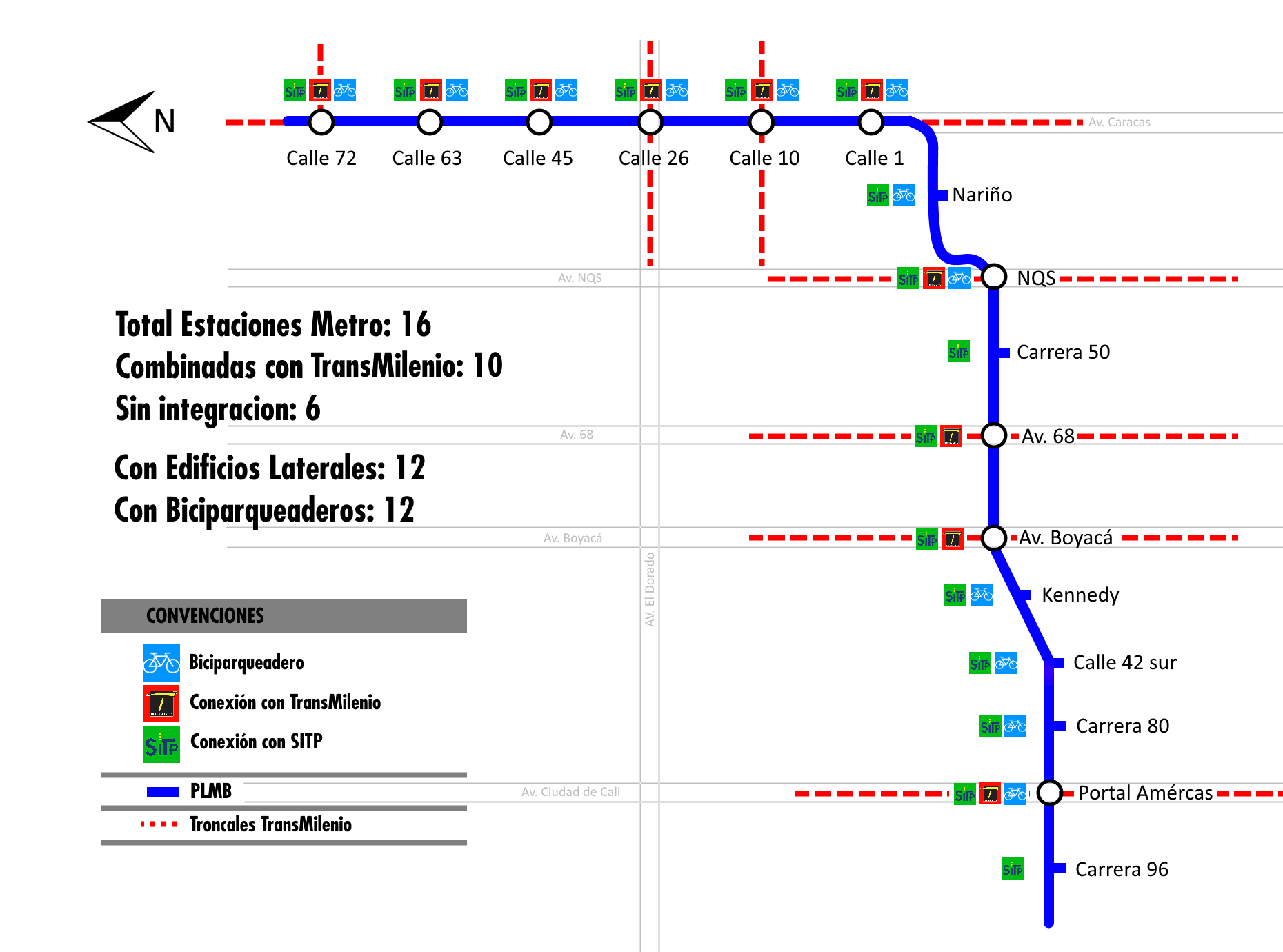 Mapa del futuro Metro de Bogota